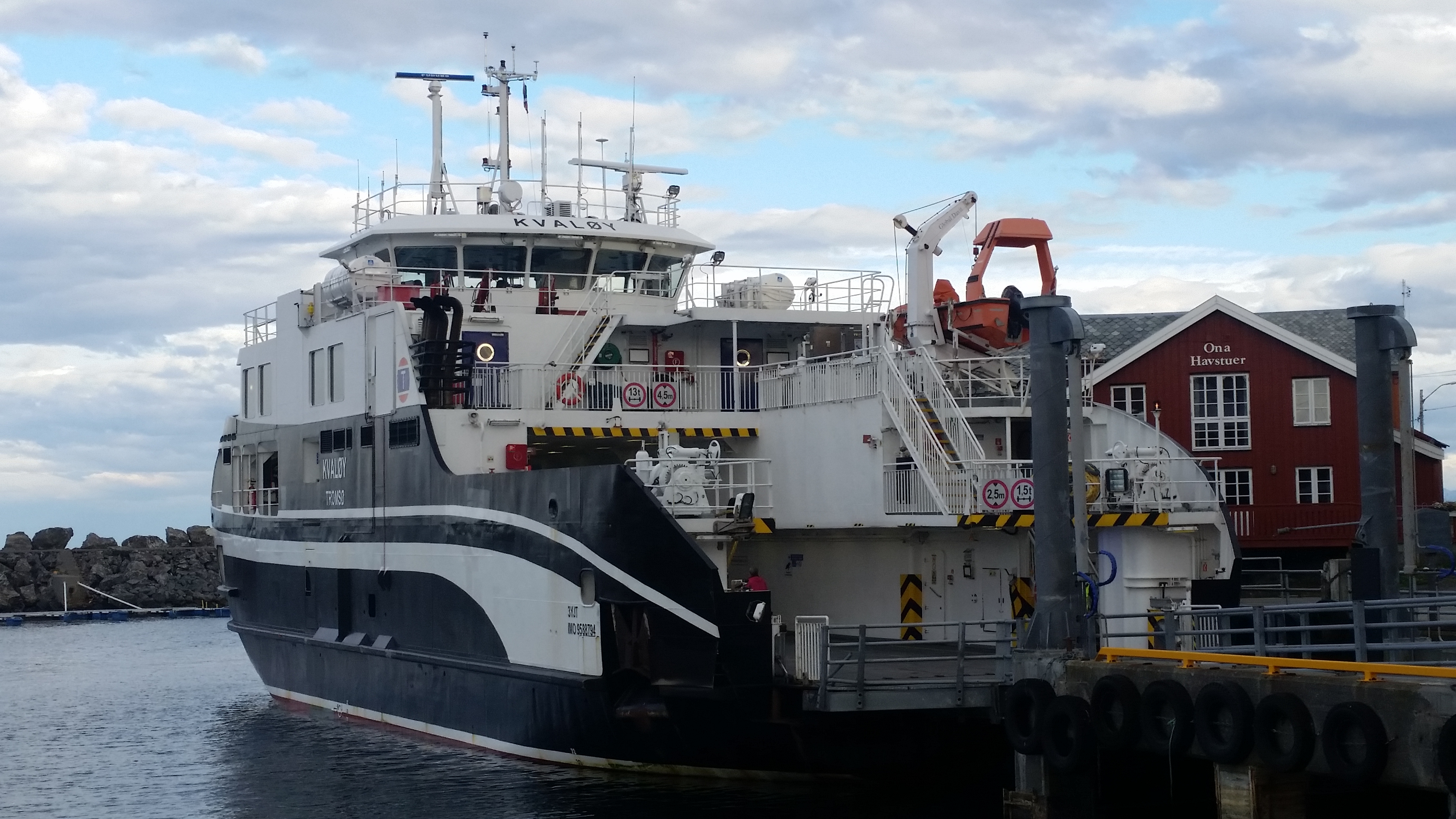 Utasundsferga MF «Kvaløy» ved kai på Ona 1. oktober 2017